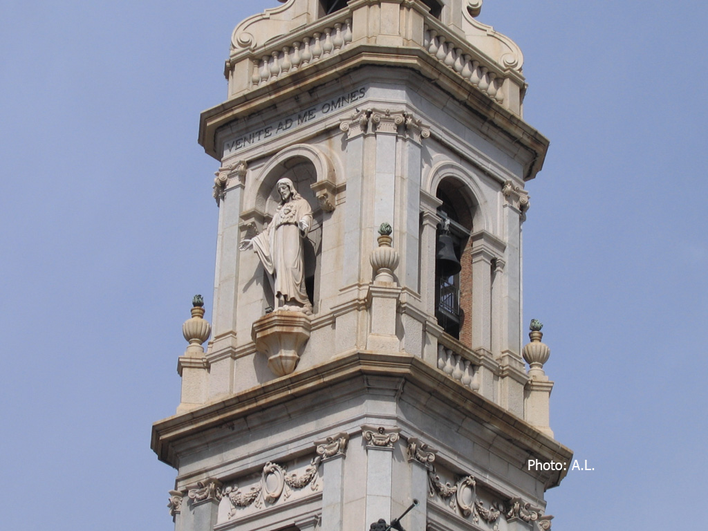 Campanile Pompei